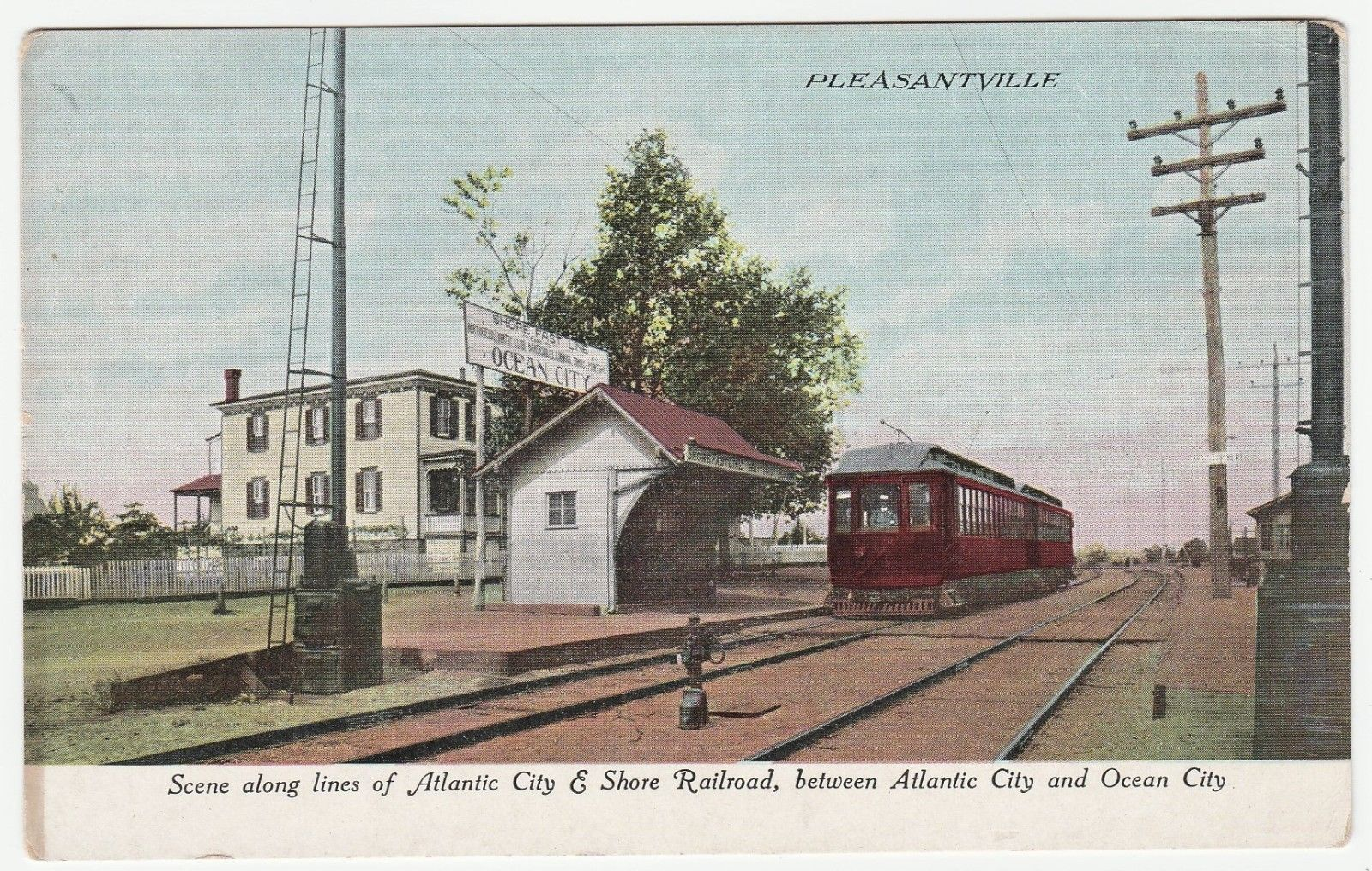 Atlantic City and Shore Railroad - Shore Fast Line. Series of 5 Cards. Atlantic City & Shore Railroad between Atlantic City and Ocean City, New Jersey.